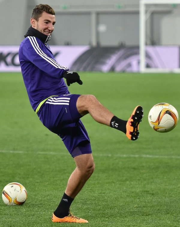 Мікаель Гейлен - футболіст Андерлехта